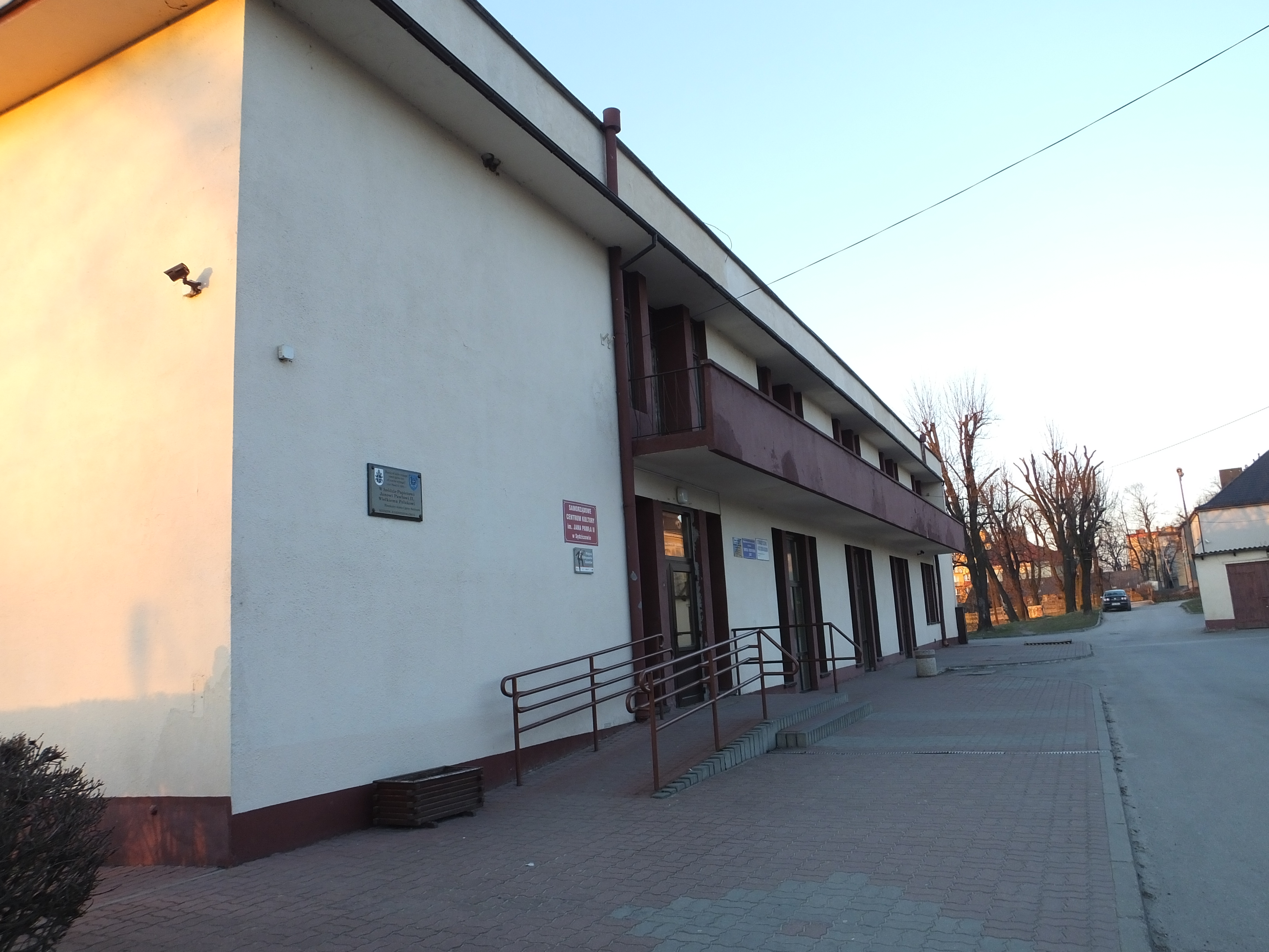 SCK Sędziszów